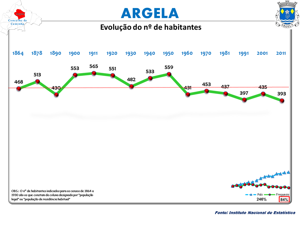 Censos 1864/2011